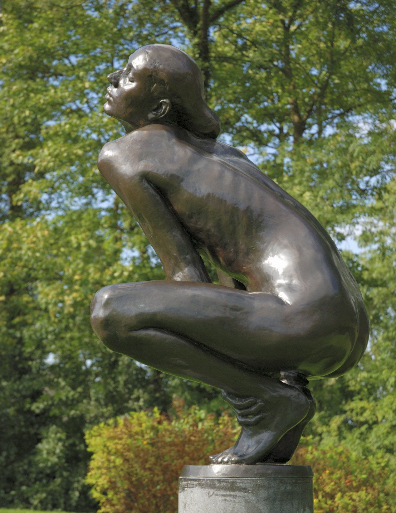 beeldhouwwerk